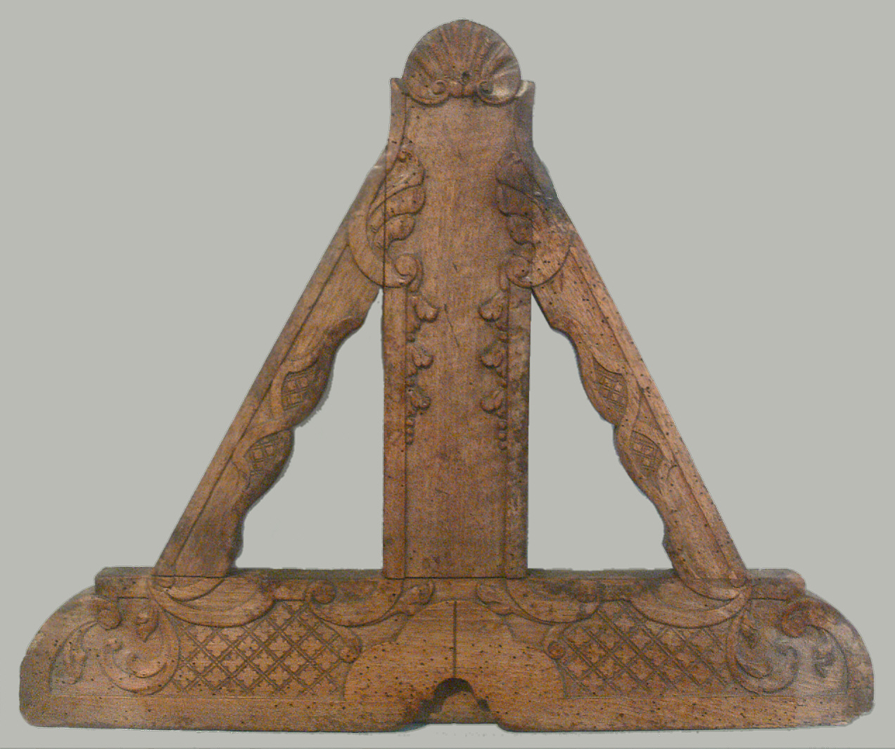 Setzwaage (sogenannter „Senkel“), aus Riedlingen an der Donau, um 1730 Landesmuseum Württemberg (Außenstelle Museum für Volkskultur in Württemberg, Waldenbuch) 1.1.3, Inv. Nr. 1960/10